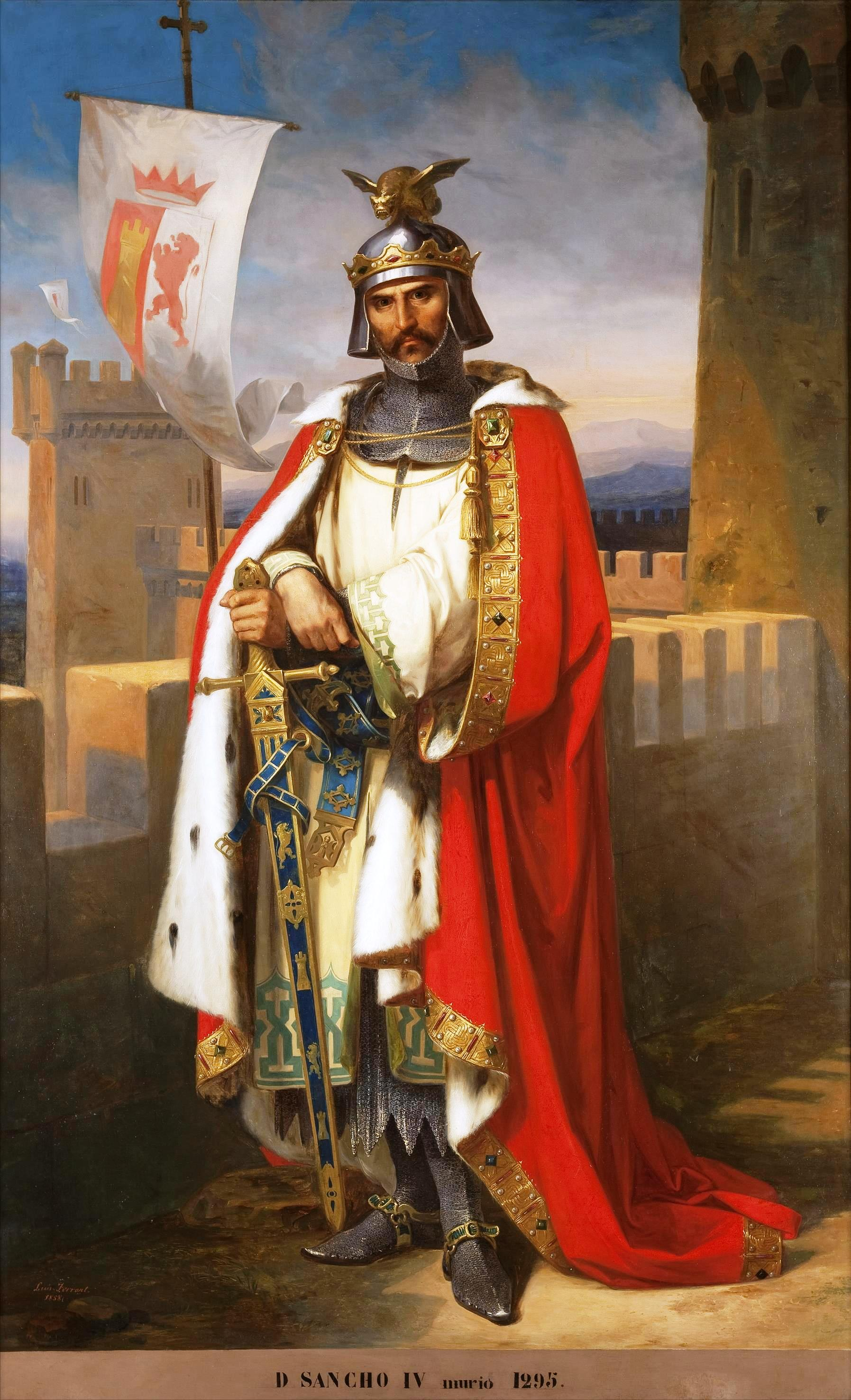 Retrato imaginario del rey Sancho IV de Castilla (1258-1295), hijo y heredero del rey Alfonso X de Castilla.